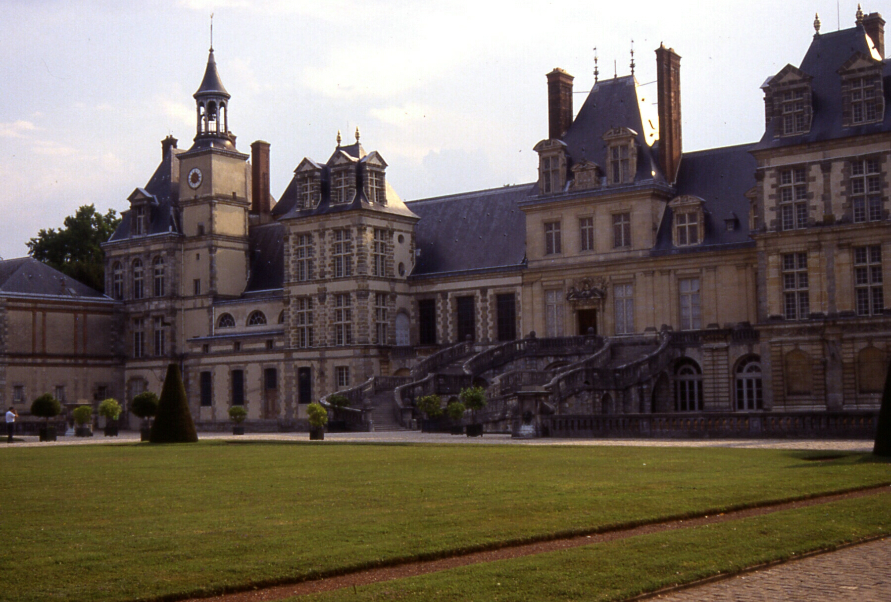 Fontainebleau Schloss 1991